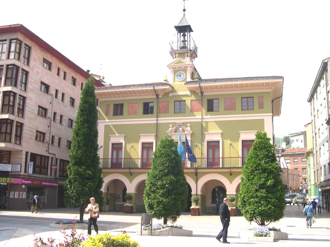 Casa'l conceyu Llangreu